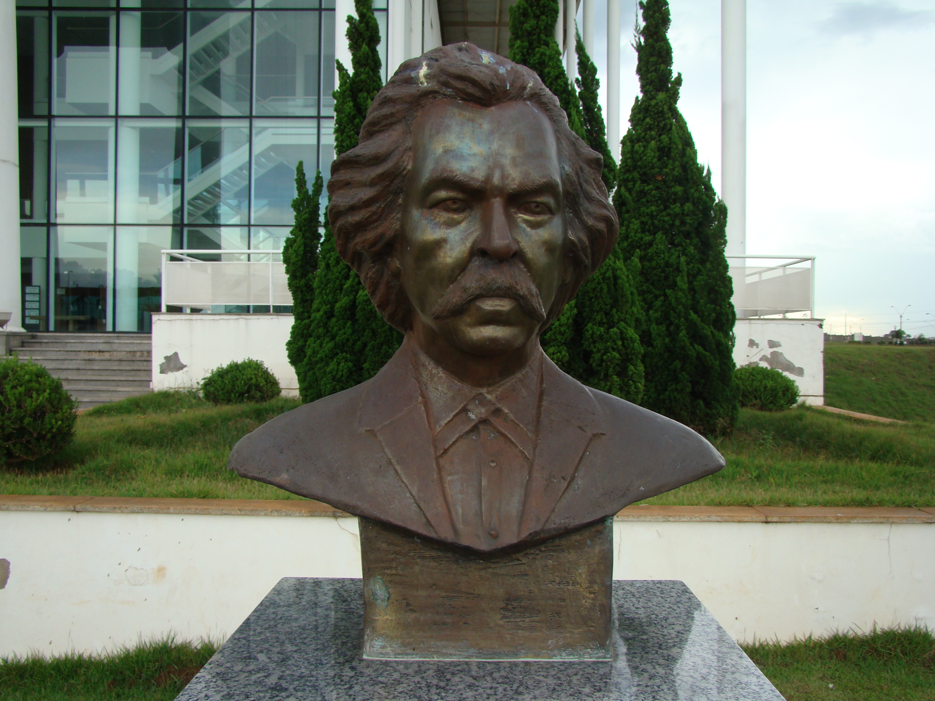 Busto em Homenagem ao Compositor Antonio Carlos Gomes em Frente ao Teatro Municipal de Paulínia, SP Brasil